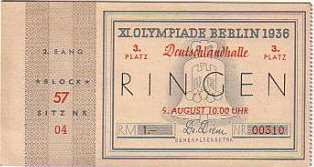 Eintrittskarte zu den Ringwettkämpfen 1936 The tickets were designed by the artist Werner Beucke and printed by the Giesecke & Devrient Press of Leipzig which specializes in the printing of securities.